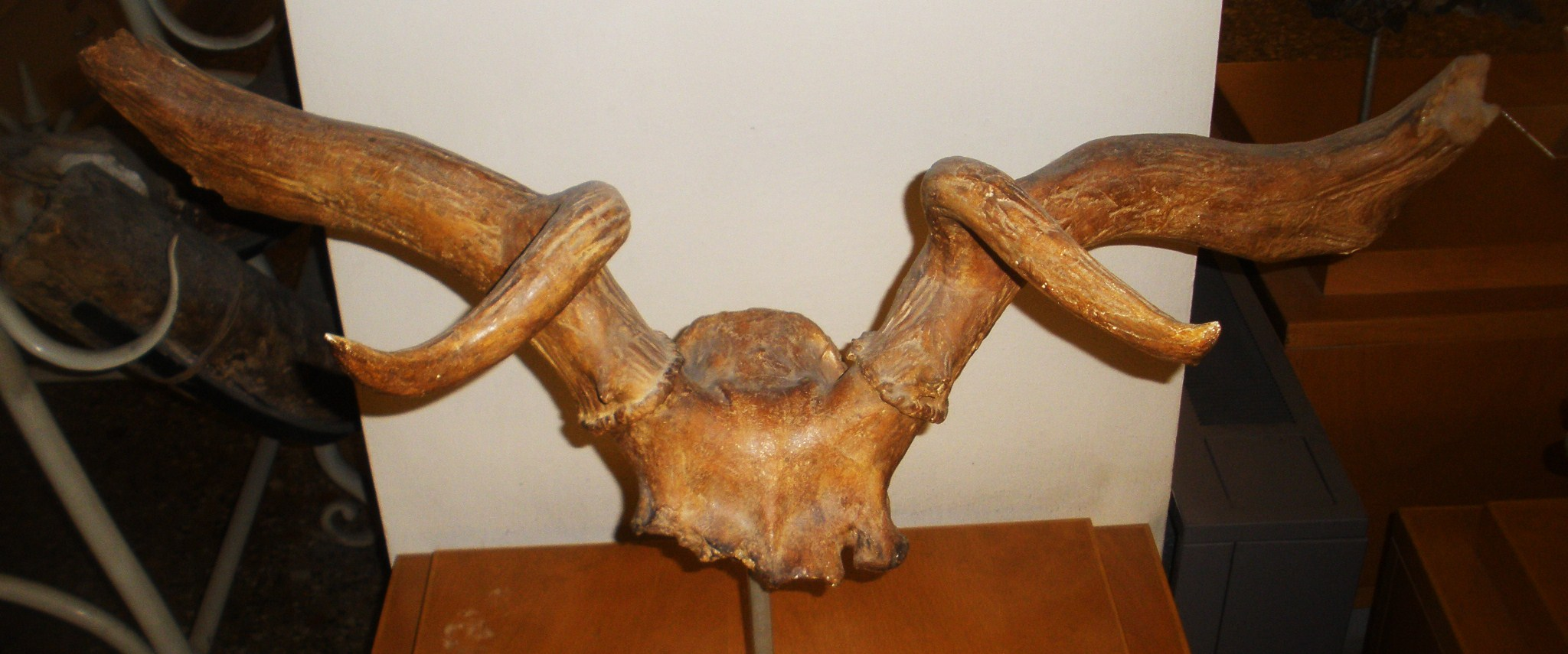 Fossil of Praemegaceros, an extinct mammal- Took the picture at Museo di Paleontologia di Firenze